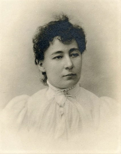 Luisa Anzoletti (1863 - 1925)